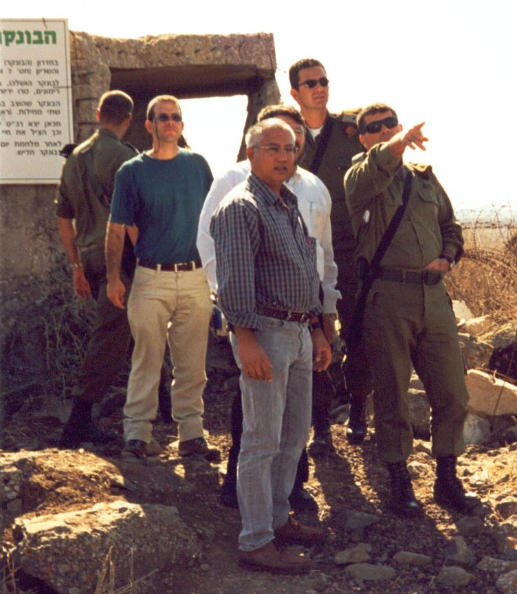 יצחק נגרקר והאלוף אשכנזי באתר תל סאקי. צולם במסגרת ביקורו של האלוף במכון הראל לזכרו של סגן הראל שרם הי"ד.